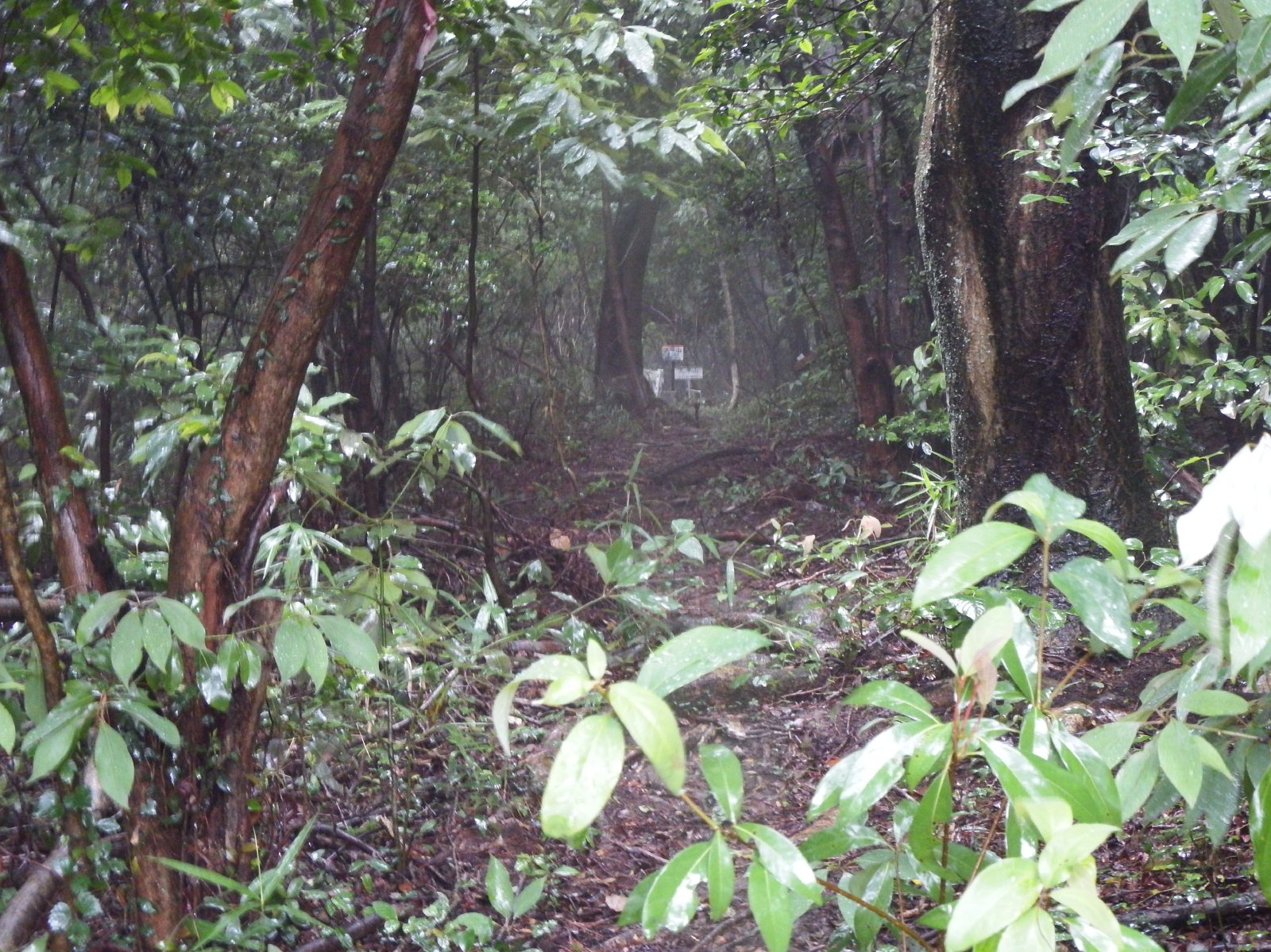 大平山の頂上